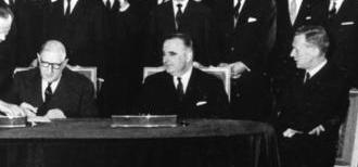 Bundeskanzler Konrad Adenauer und der französische Staatspräsident Charles de Gaulle unterzeichneten am 22.1.1963 im Pariser Elysée-Palast einen Vertrag über die deutsch-französische Zusammenarbeit, der politische Konsultationen beider Regierungen und eine verstärkte Zusammenarbeit in der Außen- und Verteidigungspolitik sowie in Erziehungs- und Jugendfragen festgelegt. Regelmäßige Treffen zwischen den Regierungschefs und den zuständigen Ressortministern beider Länder sollen die praktische Durchführung des Vertrages gewährleisten. Im Bild (v.l.n.r.) am Tisch: Bundesminister des Auswärtigen, Dr. Gerhard Schröder, Bundeskanzler Konrad Adenauer, Staatspräsident Charles de Gaulle, Premierminister Georges Pompidou und der französische Außenminister Maurice Couve de Murville